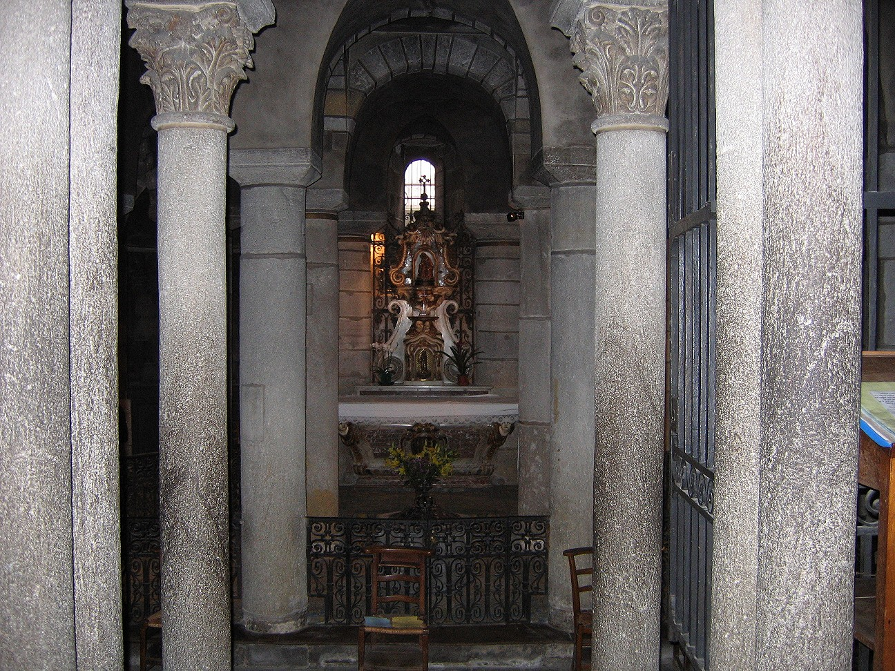 Clermont-Ferrand, Kirche (church) Notre Dame du Port, Krypta.